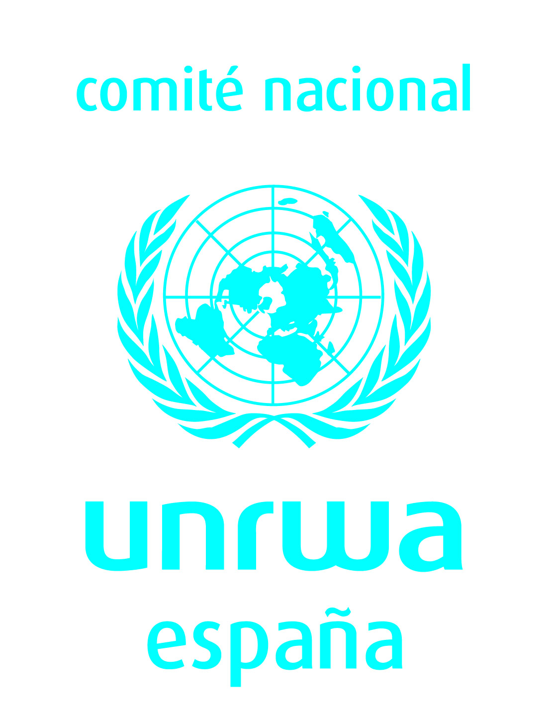 RGB España